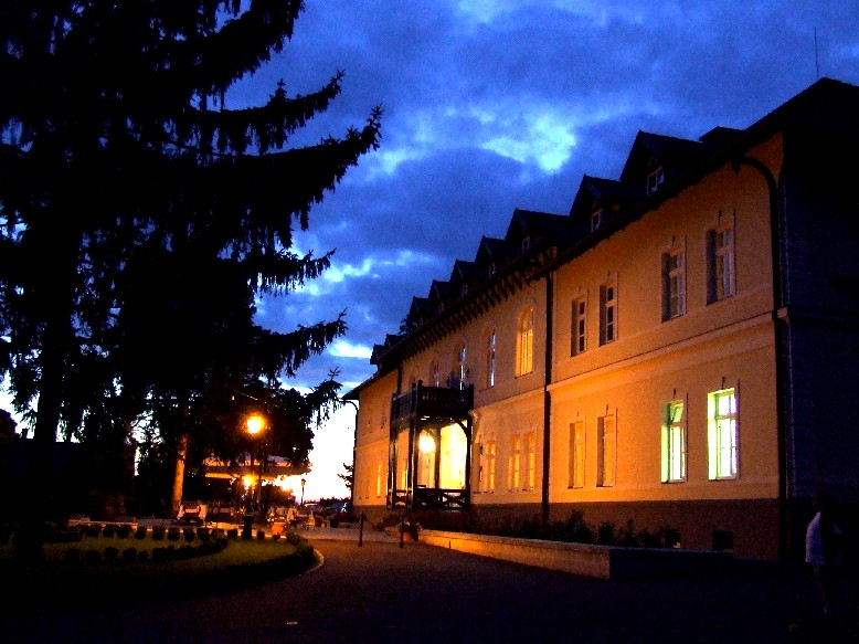 Degenfeld kastély, Tarcal. Saját kép. . Egresi János 2006. szeptember 23., 12:19 (CEST)